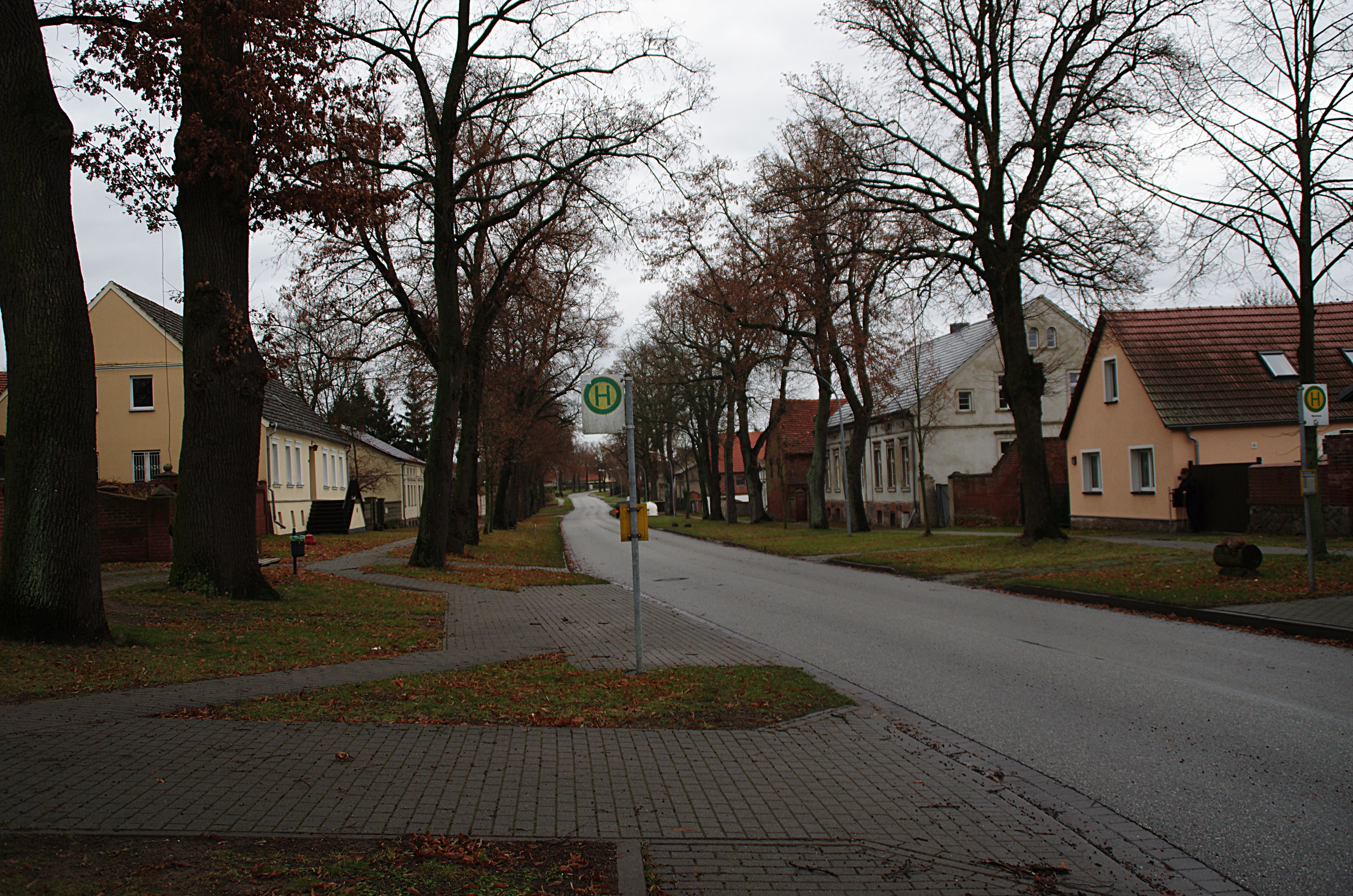 Fehrbellin in Brandenburg. Die Hauptstraße in Walchow ist die Hauptstraße.